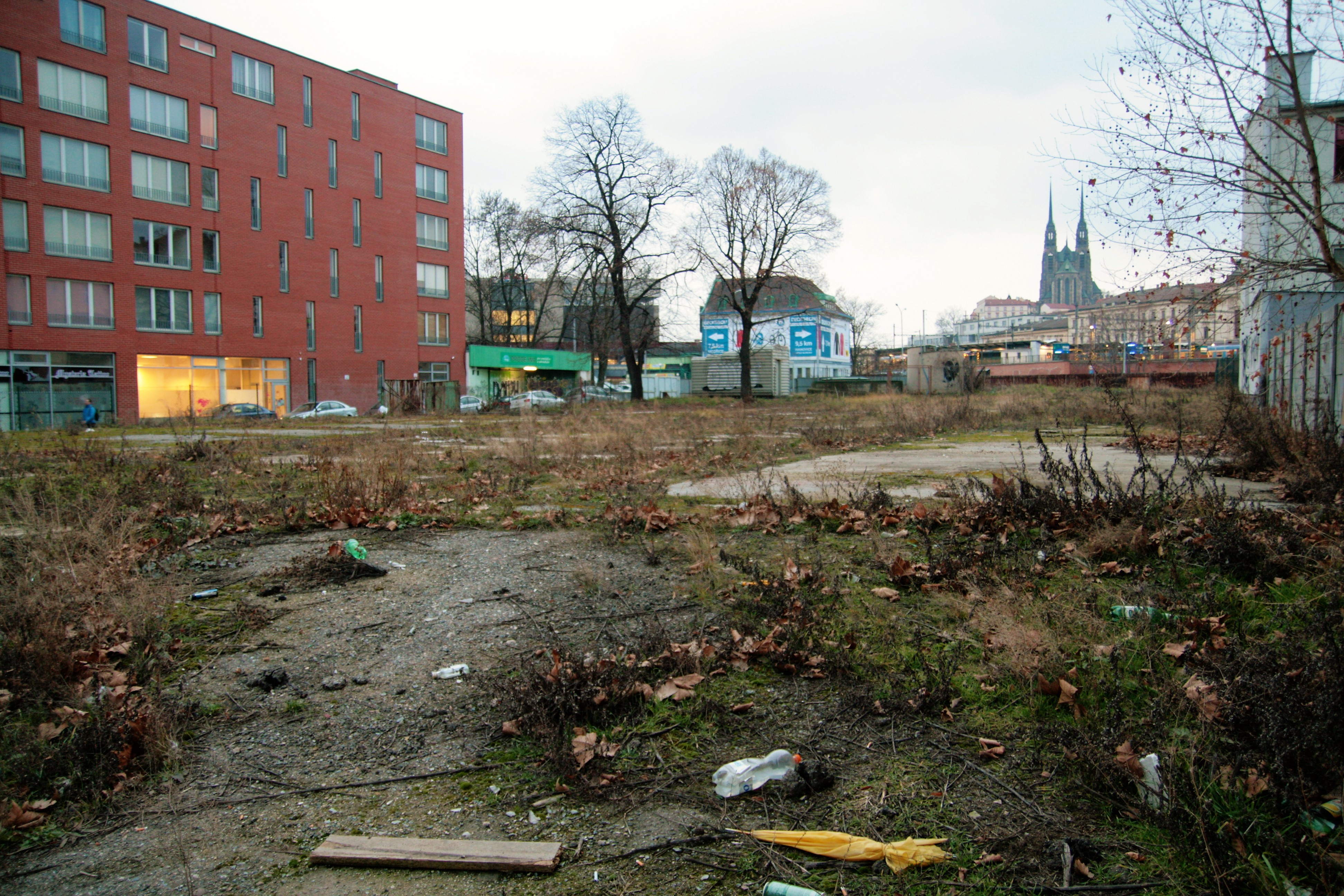 Spálená ulice v Brně-střed. Nezastavěný prostor na rohu s Příční ulicí. V pozadí vlevo dům Spálená č. 3.